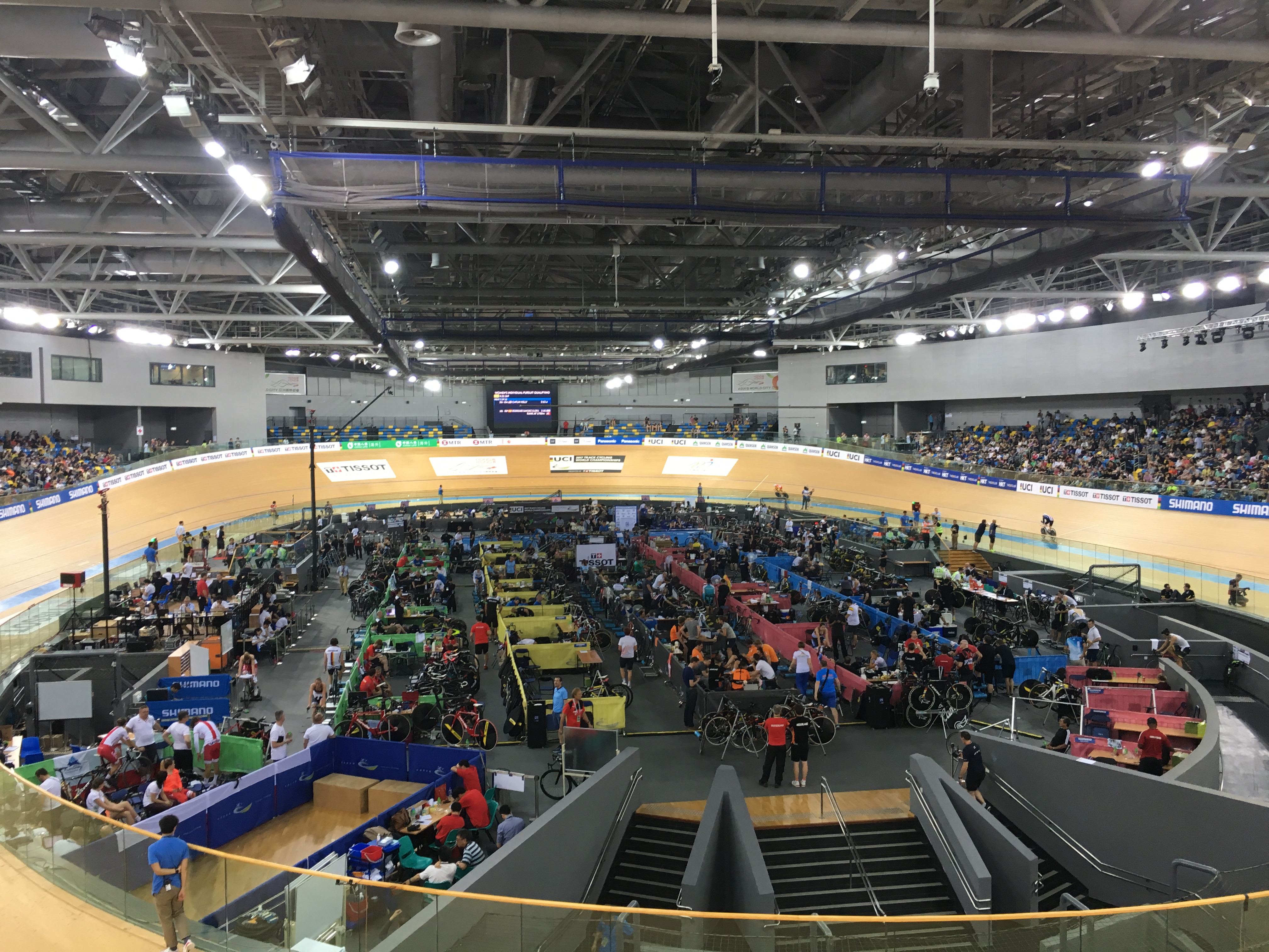 2017場地單車世界錦標賽